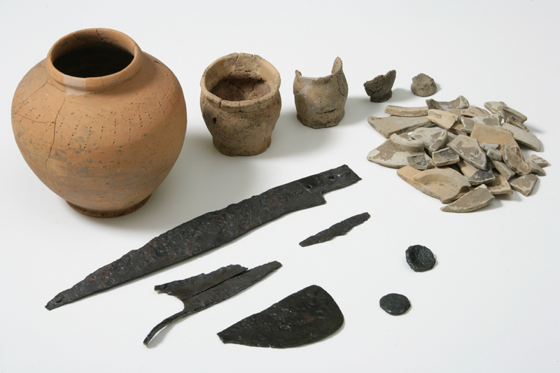 Corredo della tomba № 7, ad incinerazione con cassetta di embrici, rinvenuta nel 1984, composto da un'urna e tre olle piccole in ceramica, un coltellaccio di tradizione celtica, un coltellino, un rasoio e cesoie in ferro, una moneta (asse repubblicano) e un piccolo ciondolo in bronzo e numerosi frammenti di patere e coppe a vernice nera, frammentate durante il rito funebre e poi deposte nella tomba. La tomba, mischiando elementi celtici con elementi romani (l'obolo di Caronte) mostra la progressiva assimilazione di costumi romani.